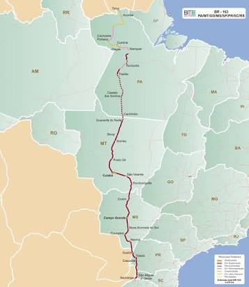 Mapa descritivo da BR-163 em relação as outras rodovias brasileiras.